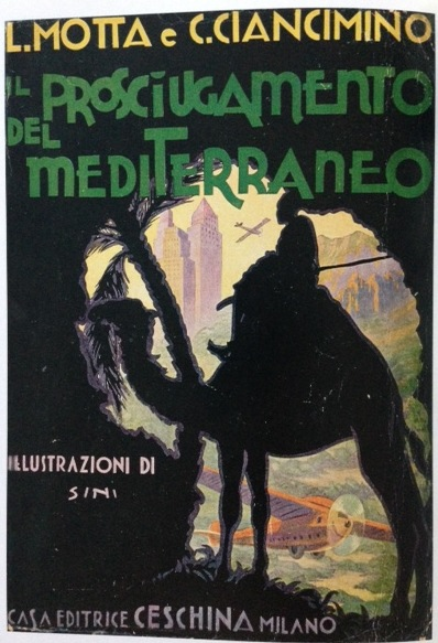 Copertina del romanzo di fantascienza Il prosciugamento del Mediterraneo (1931) di Luigi Motta e Calogero Ciancimino. Illustrazione di Tarquinio Sini (1891 – 1943).